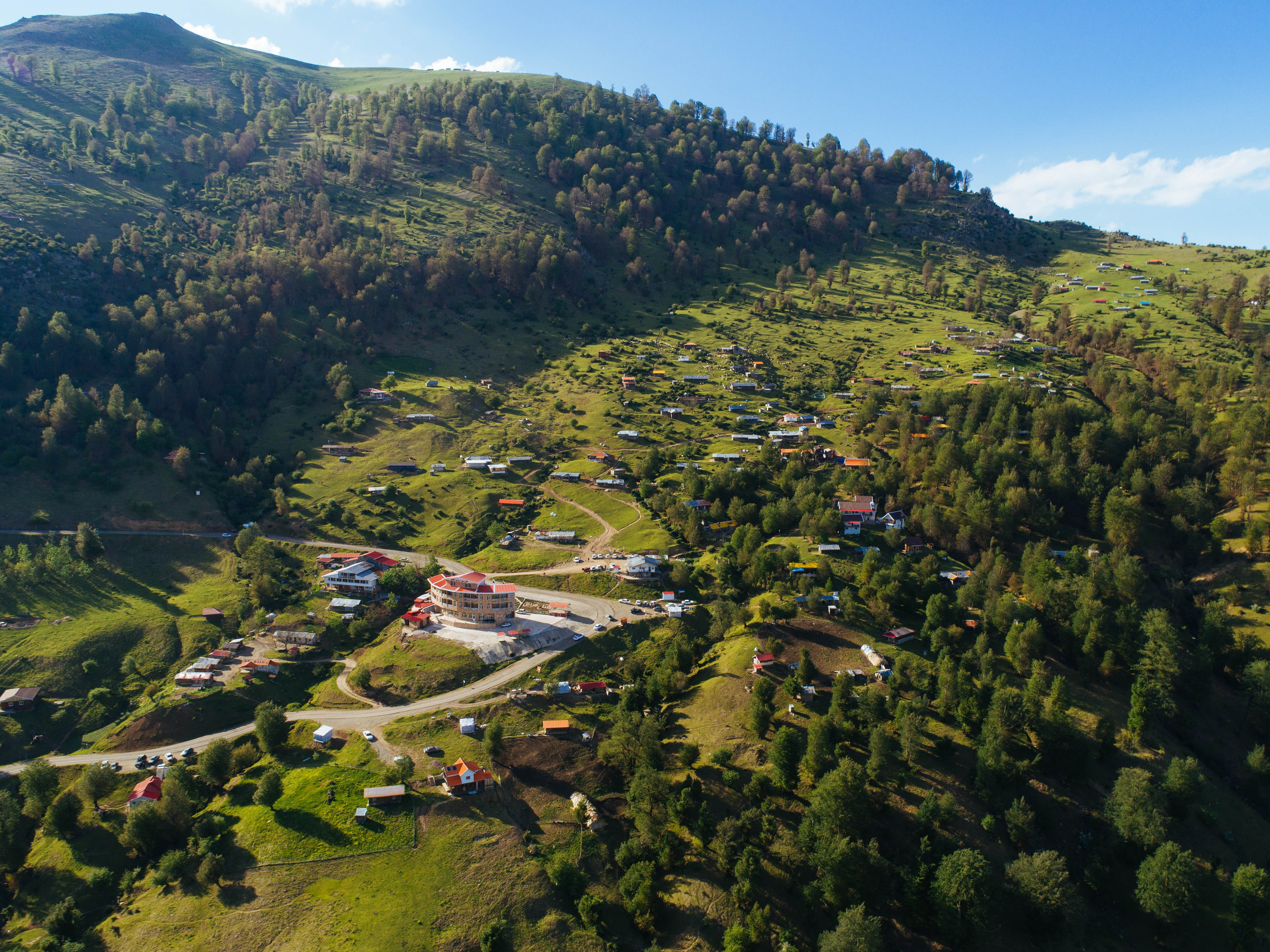 ماسال شهری در استان گیلان ایران که در کنار کوه‌های تالش واقع شده‌است. معنی کلمه ماسال کوه وار یا کنار کوه یا دارای کوه است که از کلماتی مانند مسال,مازال و ... گرفته شده است فاصلهٔ ماسال از شهر تالش ۶۰ کیلومتر است و با رشت از راه صومعه‌سرا ۵۵ کیلومتر فاصله دارد. تصویر از ارتفاعات با کمک جناب فرید کامرانیا از ماسال تهیه شده است